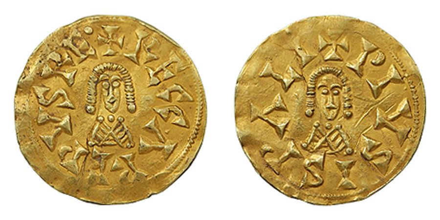 Tremis visigodo de oro acuñado en Sevilla ("Ispali") durante el reinado de Recaredo I. Leyendas: anverso "+RECCAREDVSRE·." reverso "+PIVS ISPALI". Fuente: Ruth Pliego, La Moneda Visigoda, 2009, 106E. Conservación: MBC+/MBC.